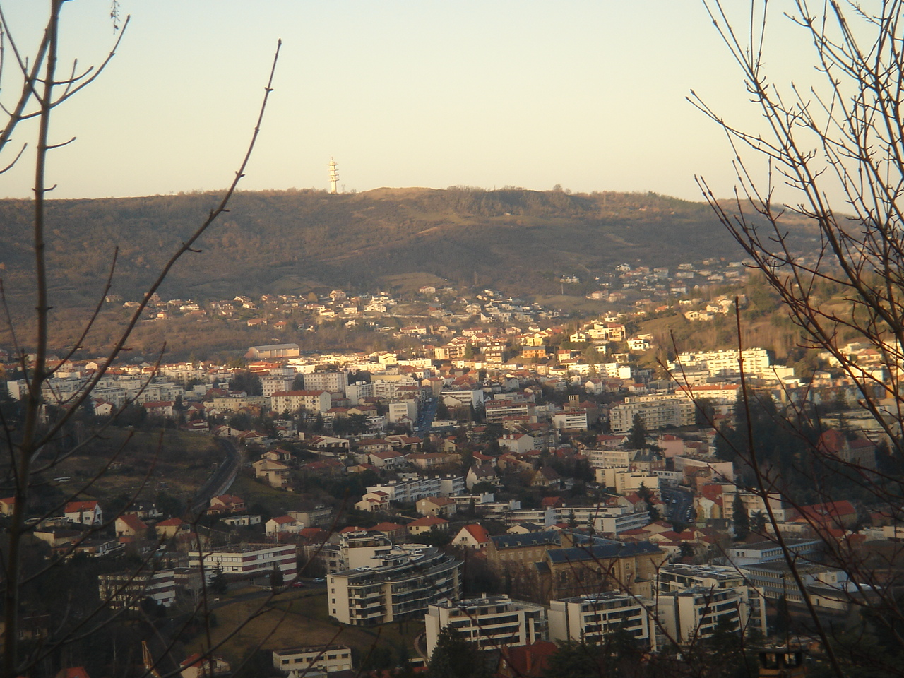 Vue d'une partie de la ville de Chamalières